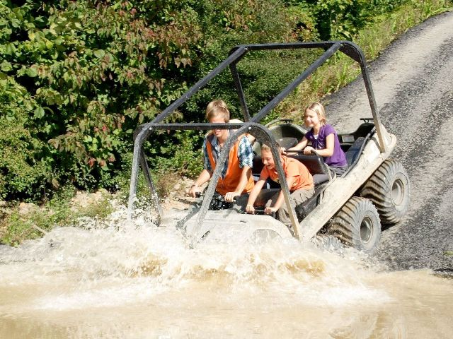 Dieses Bild zeigt das Amphibienfahrzeug, auch Maulwurf genannt, mit dem in der Erlebnisachterbahn Monsterrace im Monsterpark Rattelsdorf gefahren wird. Es wurde im Jahr 2011 im Monsterpark Rattelsdorf aufgenommen.